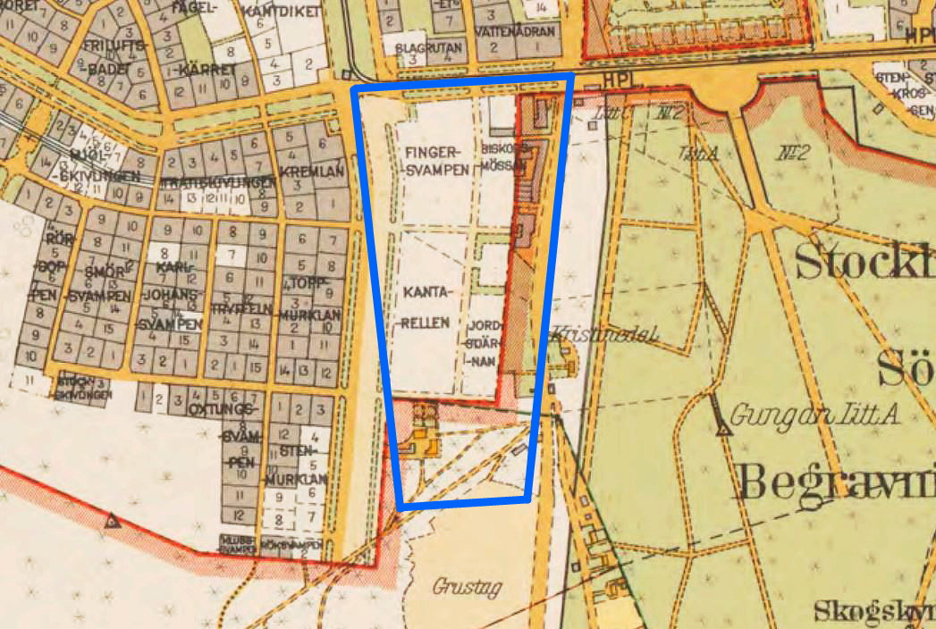 Del av Karta "Stockholms stad med omnejd i 12 blad" 1917-1934 visande läget för Enskede företagsområde.